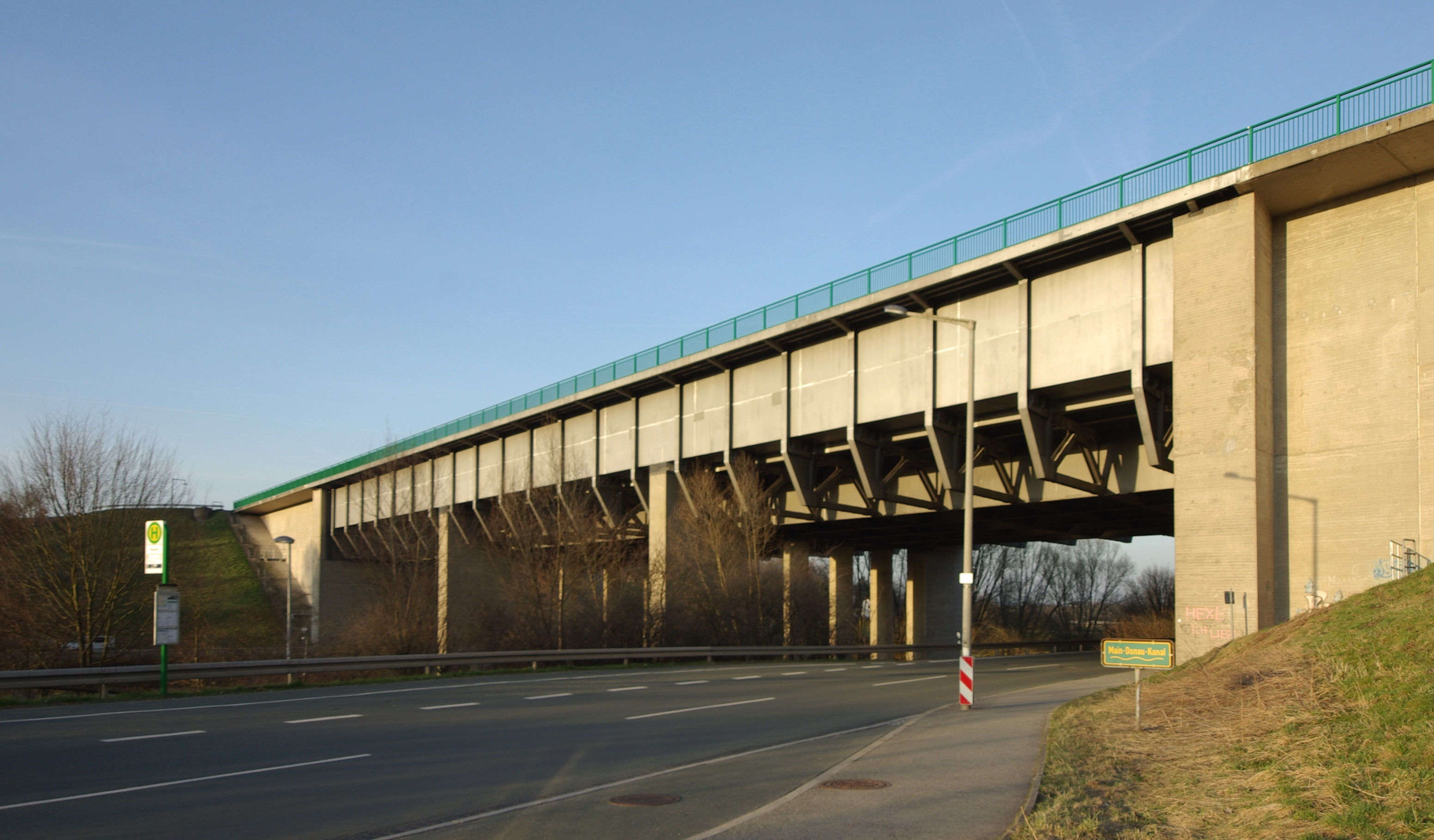 Stahltrogbrücke des Main-Donau-Kanals über das Zenntal bei Flexdorf/Atzenhof